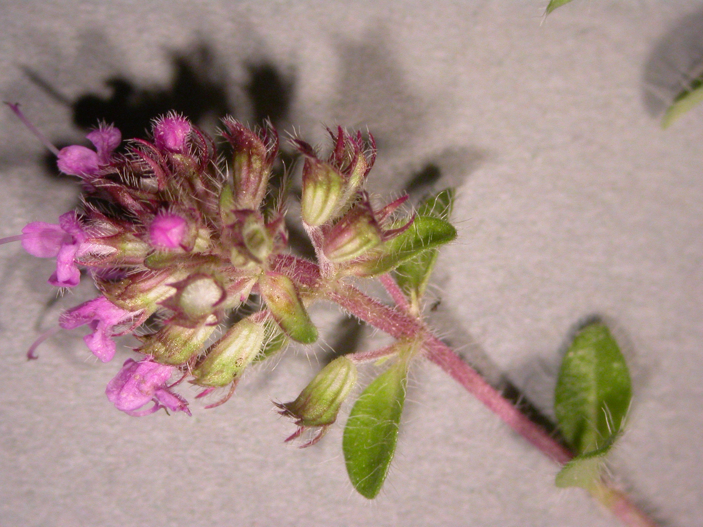 Thymus praecox-subsp-praecox Bray-sur-Somme (Somme), France